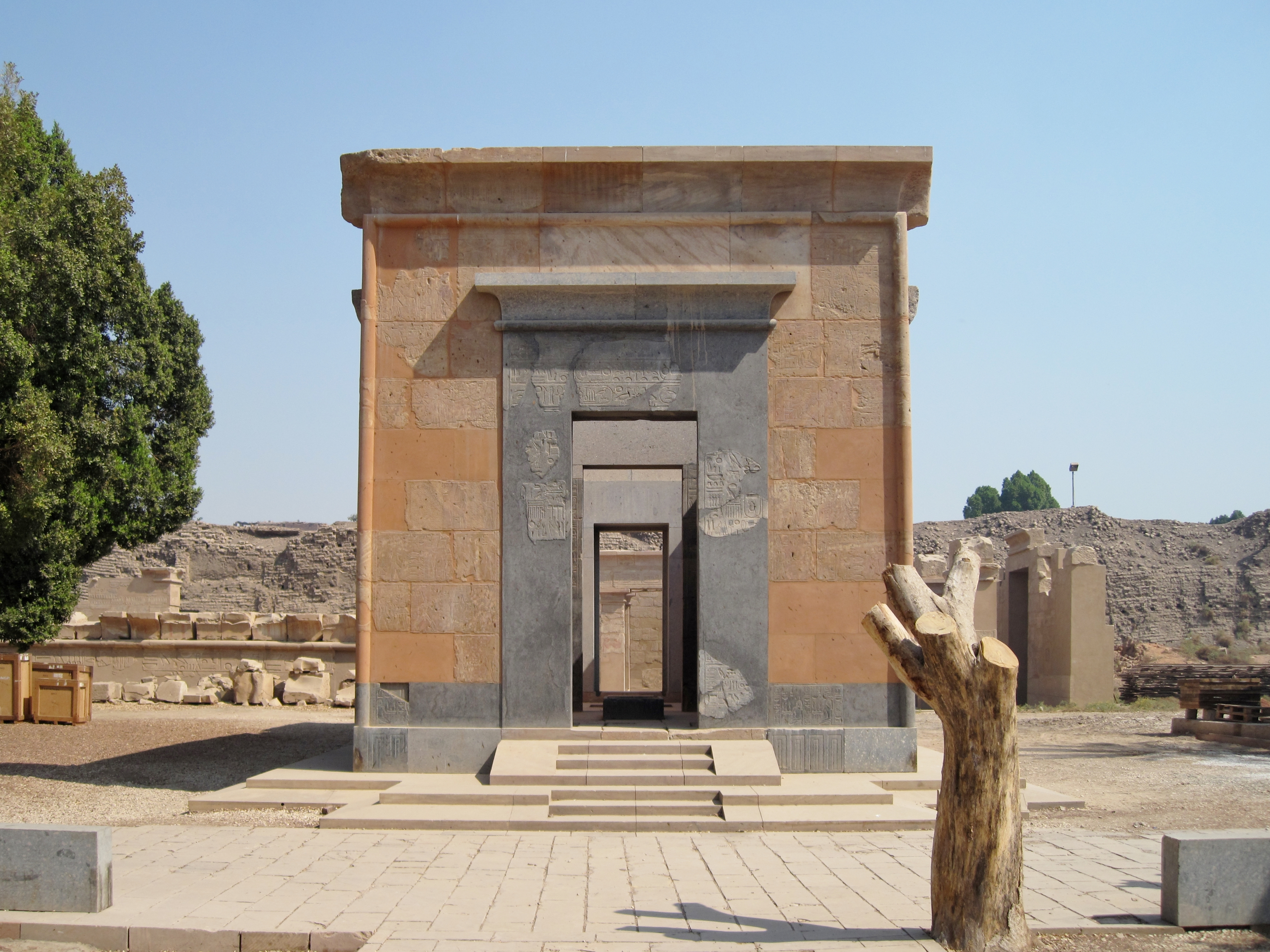 Im Jahr 2000 wiedererrichtete Rote Kapelle der Hatschepsut im Freilichtmuseum von Karnak, nördlich von Luxor, Ägypten